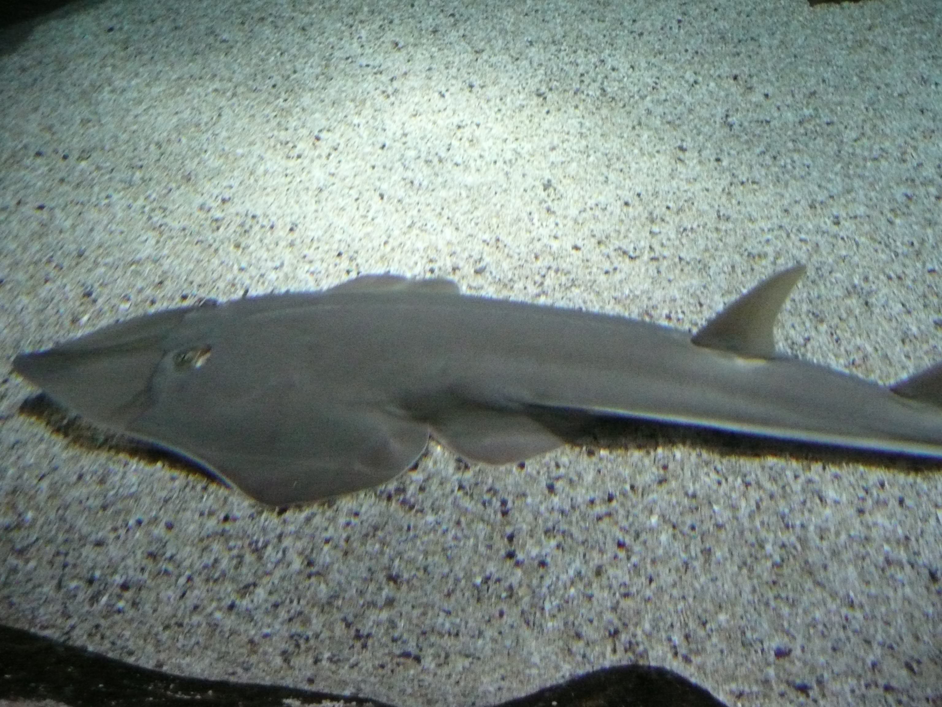 Rhinobatos rhinobatos in the Aquarium de La Rochelle